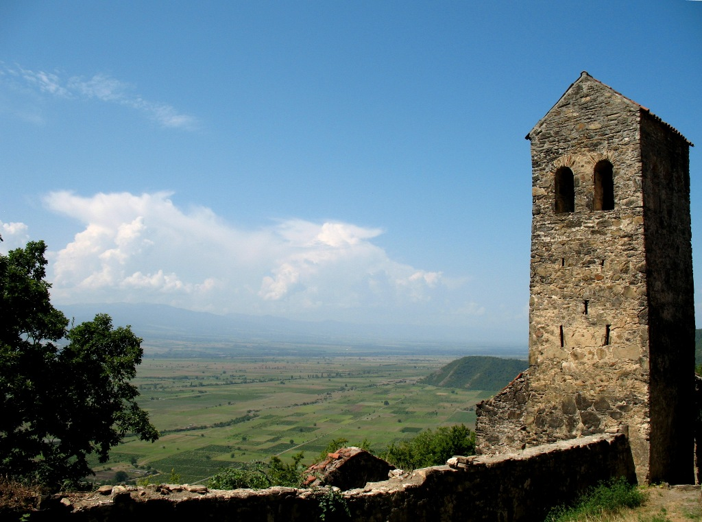 ნეკრესი